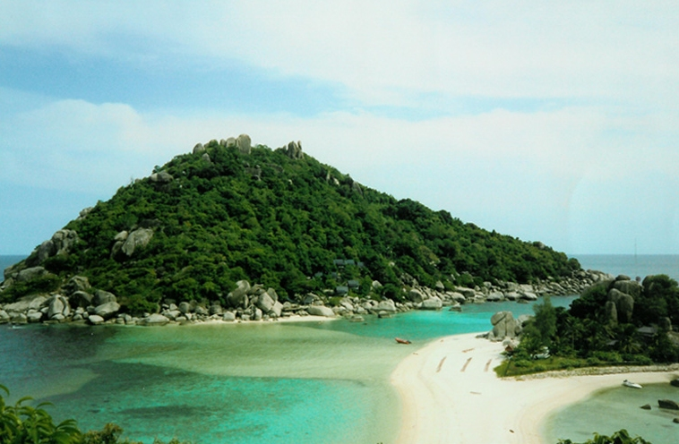 Koh Nang Yuan - Thailand, 1997